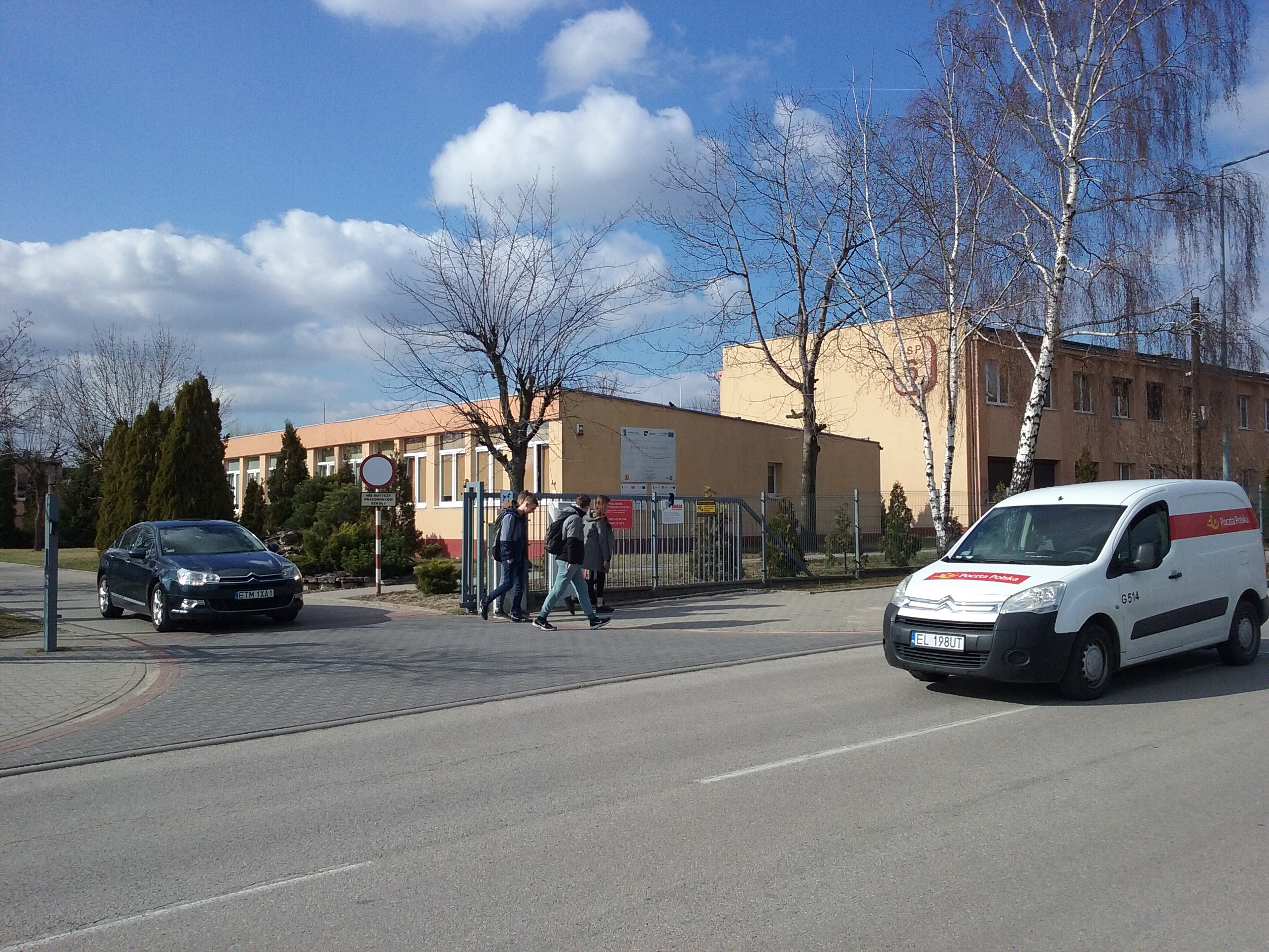 Tomaszów Mazowiecki w województwie łódzkim PL, EU. Ponadgimazjalna szkoła plastyczna, przy ulicy Strefowej 3. CC0